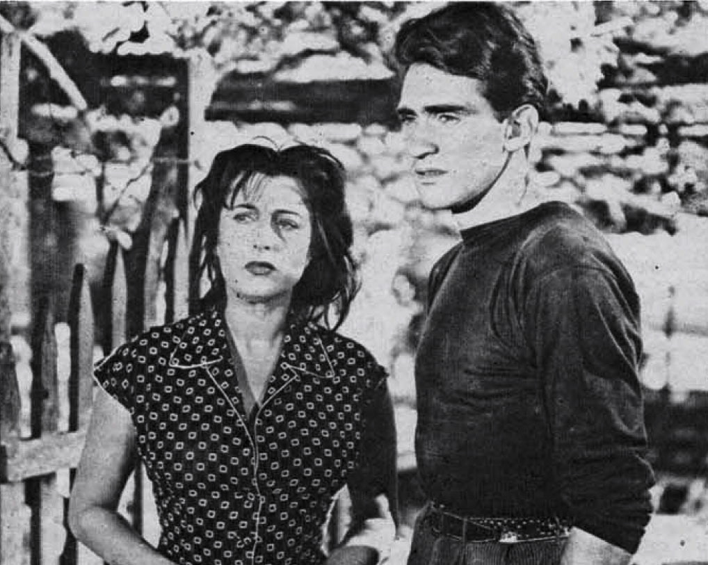 Anna Magnani e Walter Chiari in "Bellissima"-1951